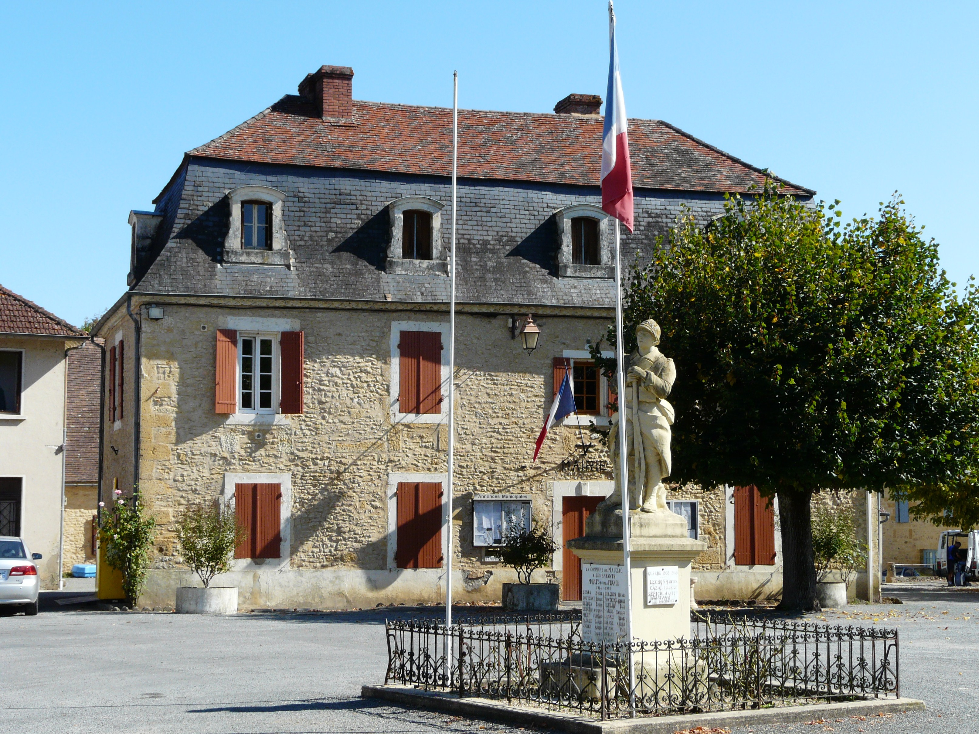 Le monument aux morts et la mairie de Mauzac-et-Grand-Castang, Dordogne, France.